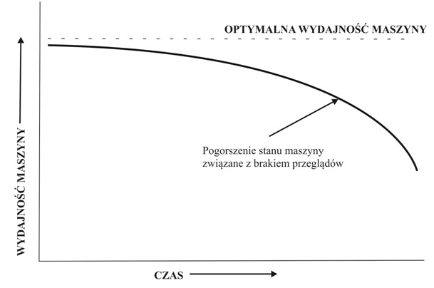 Jak zachowuje się efektywność maszyn bez wdrożonego TPM